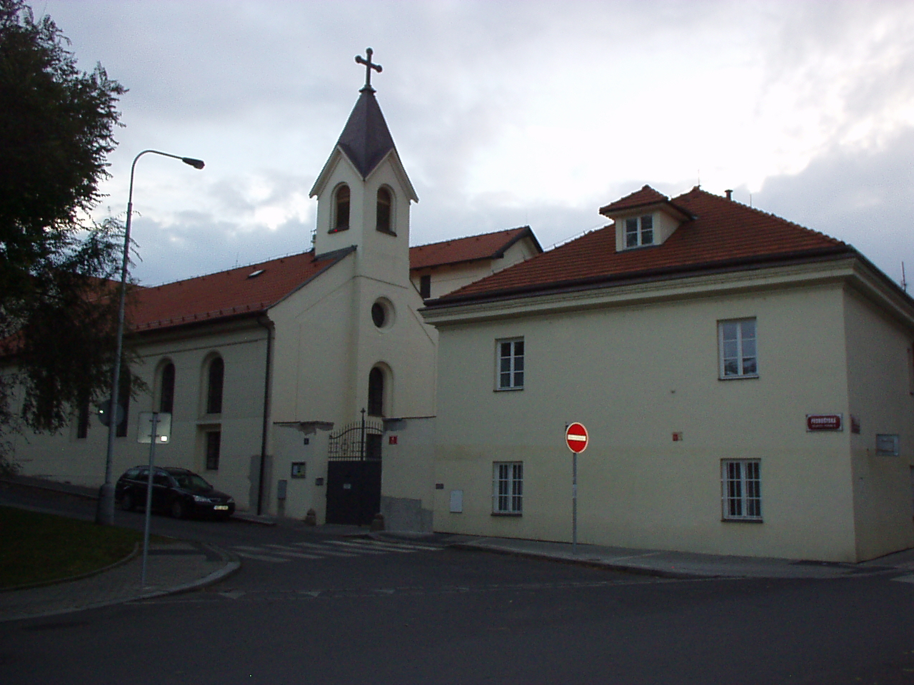 kostel sv. Václava v Praze-Dejvicích – věž